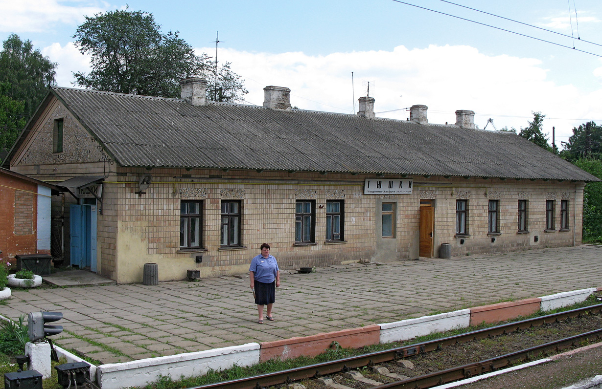 Тюшки